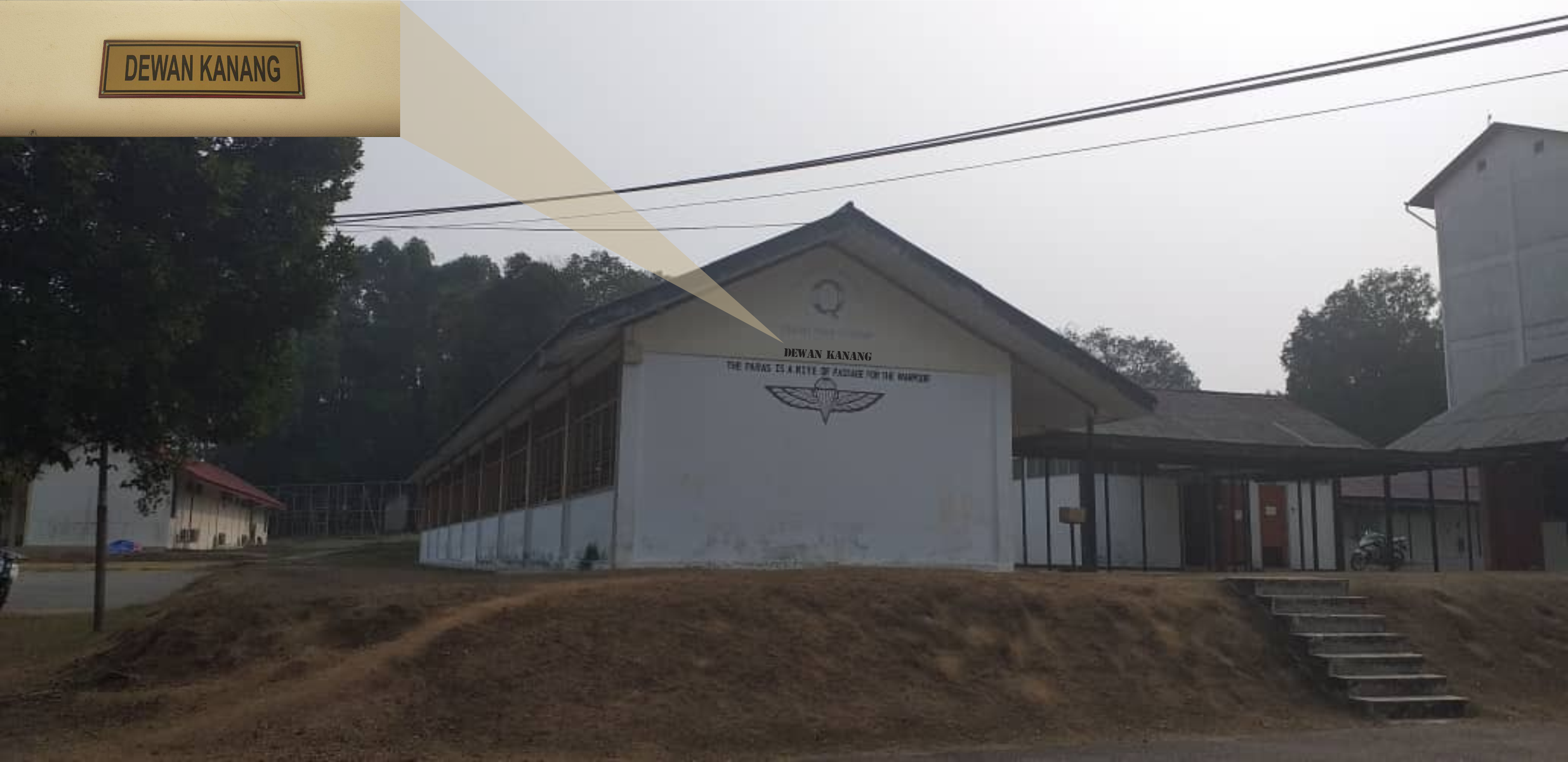 Dewan Kanang